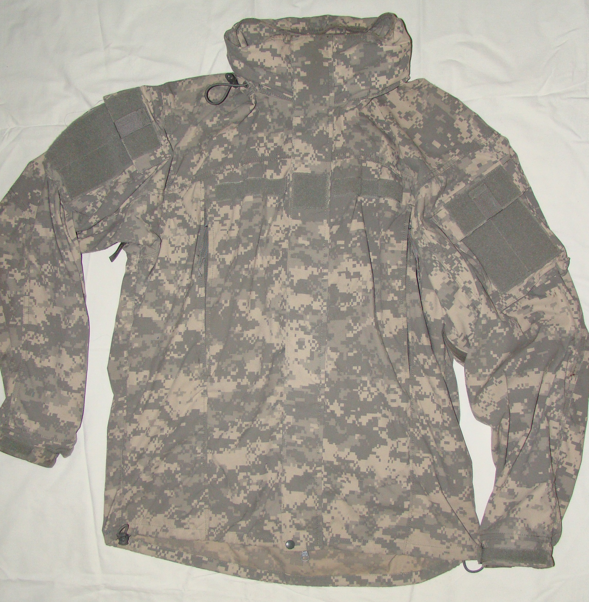 Kurtka softshell (level 5) z systemu ECWCS gen. III